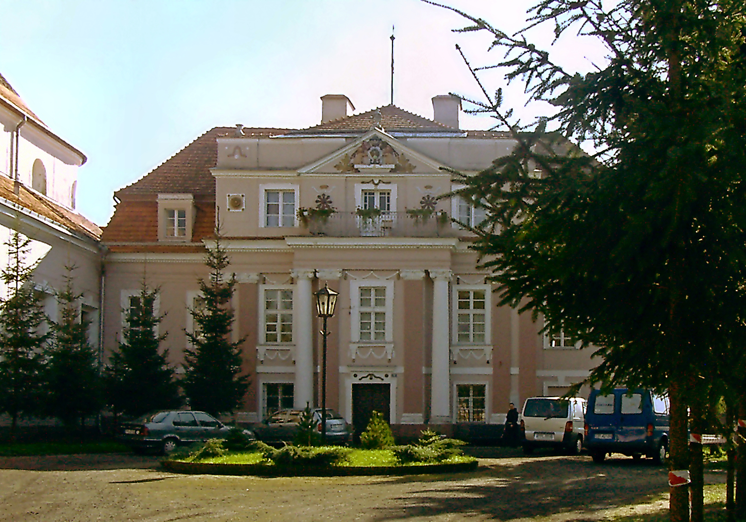 Chocz, pałac infułatów, obecnie plebania